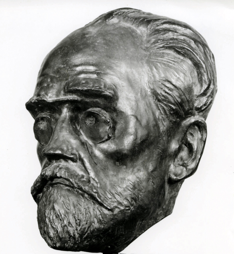 Portrait d'Emile Zola